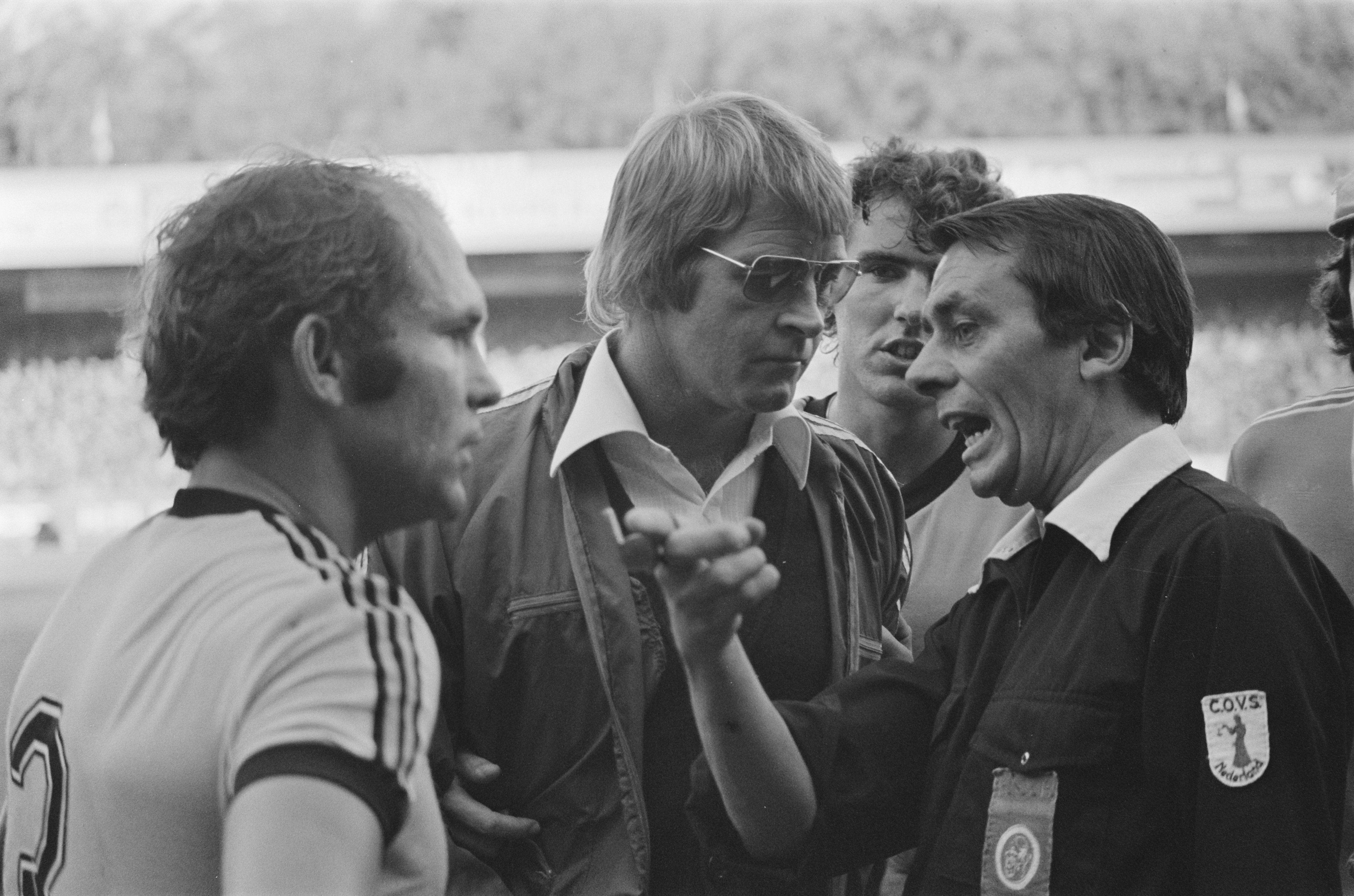 Collectie / Archief : Fotocollectie Anefo Reportage / Serie : [ onbekend ] Beschrijving : AZ 67 tegen Roda JC 2-1; Roda trainer Jacobs wordt naar zijn plaats gestuurd door scheidsrechter Siem Wellinga Datum : 24 oktober 1976 Trefwoorden : scheidsrechters, sport, trainers, voetbal Persoonsnaam : Roda Instellingsnaam : Roda JC Fotograaf : Suyk, Koen / Anefo Auteursrechthebbende : Nationaal Archief Materiaalsoort : Negatief (zwart/wit) Nummer archiefinventaris : bekijk toegang 2.24.01.05 Bestanddeelnummer : 928-8457